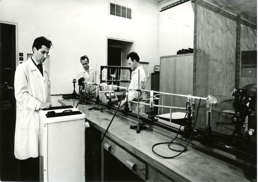 Lucian Blanaru, Virgil Vasiliu, si Anton Agafitei la lucru in 1962, realizand primul laser de conceptie romaneasca